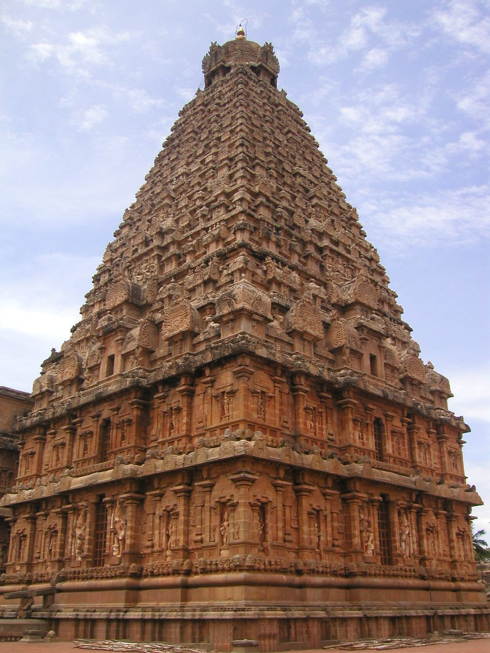 Brihadeeswarar Temple in Thanjavur